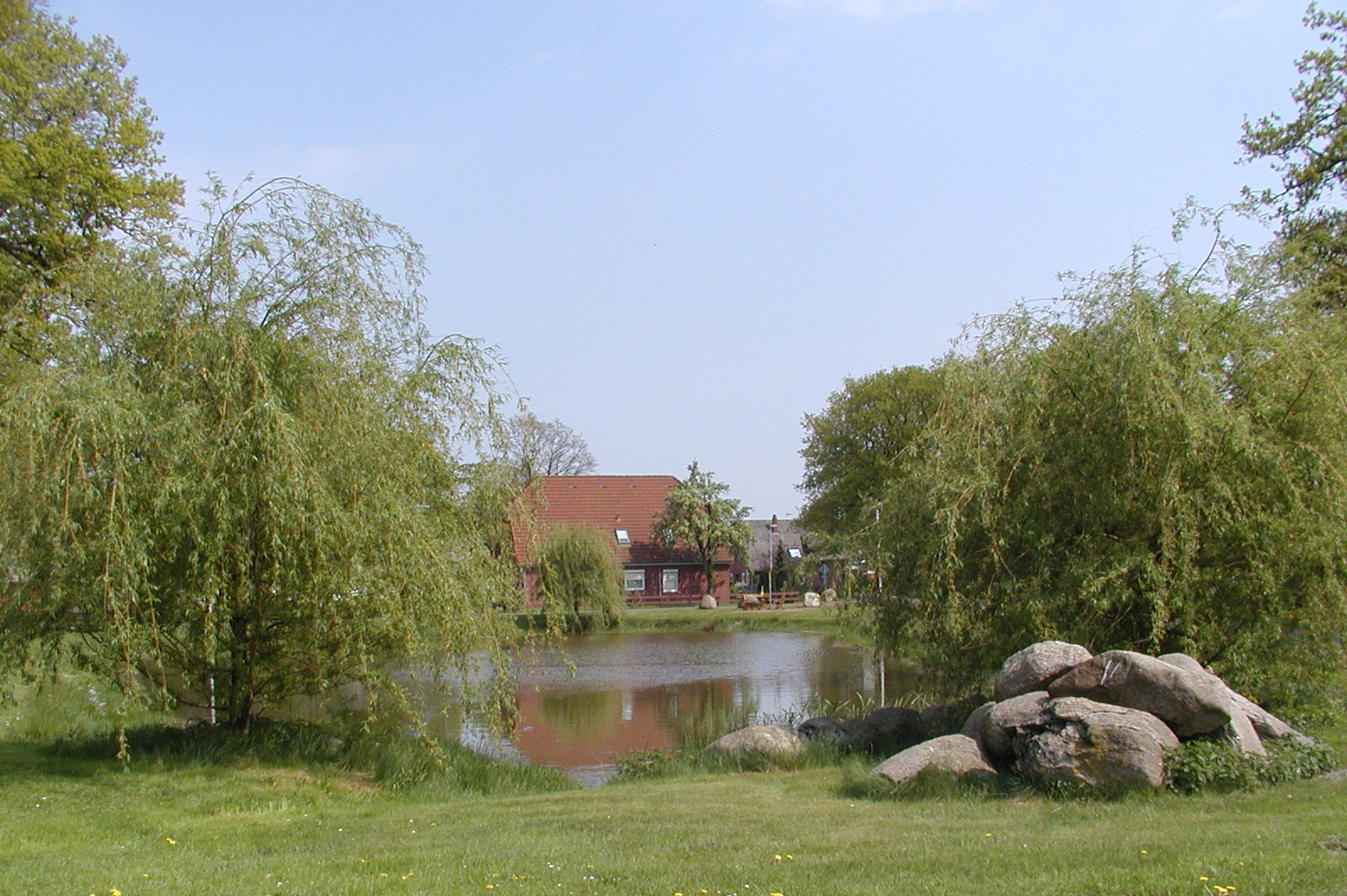 Der Löschteich, früher Sandkuhle in Stinstedt